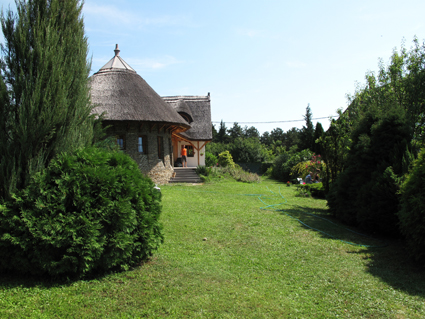 A Csopaki Művésztelep bázisa